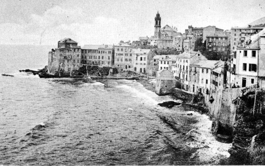 Panorama di fine XIX secolo di Bogliasco, Liguria, Italia